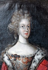 Anna Sophie von Hessen-Darmstadt (1638-1683), Äbtissin von Quedlinburg